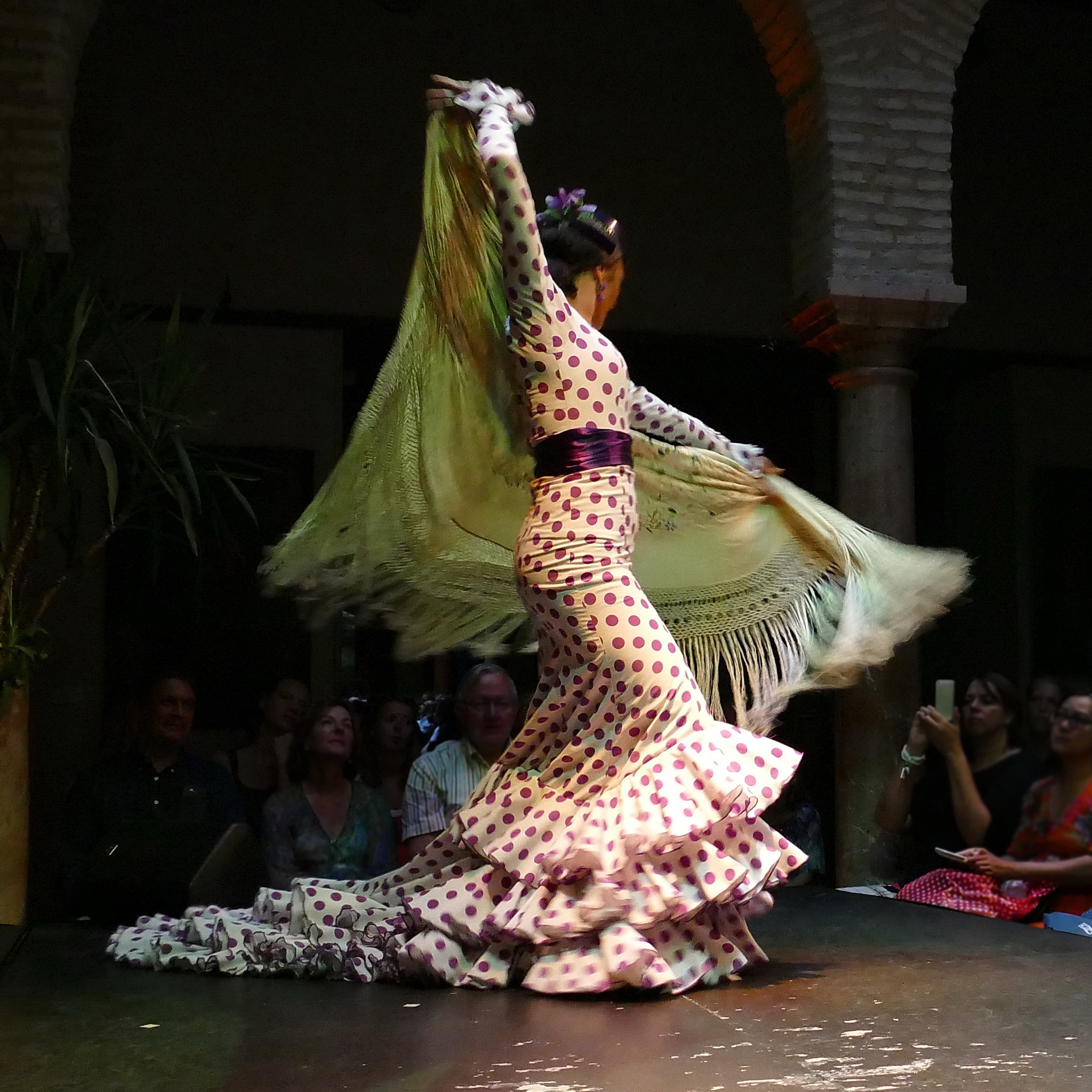 Baile flamenco en el museo de Baile Flamenco de Sevilla.